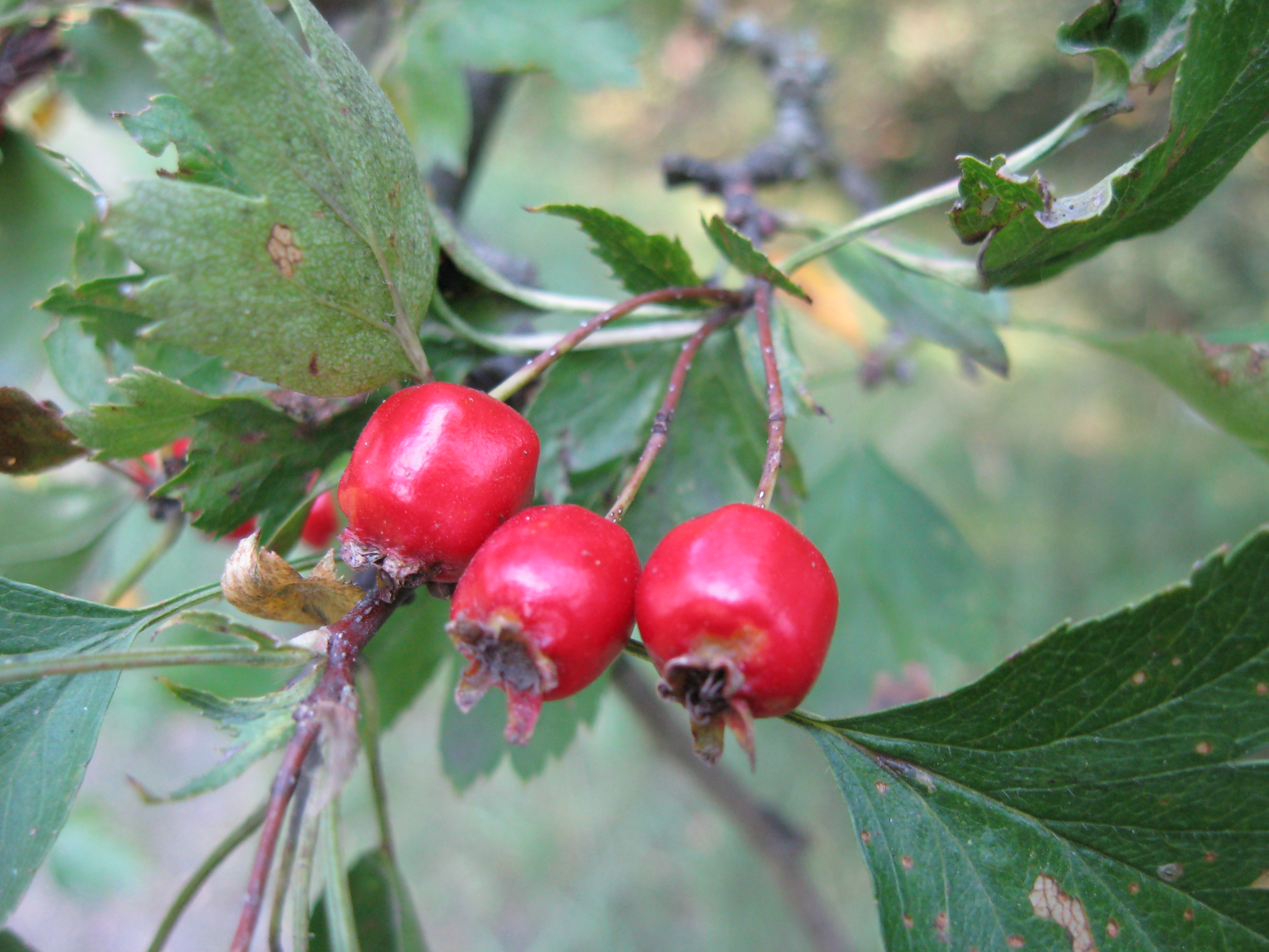 Crataégus